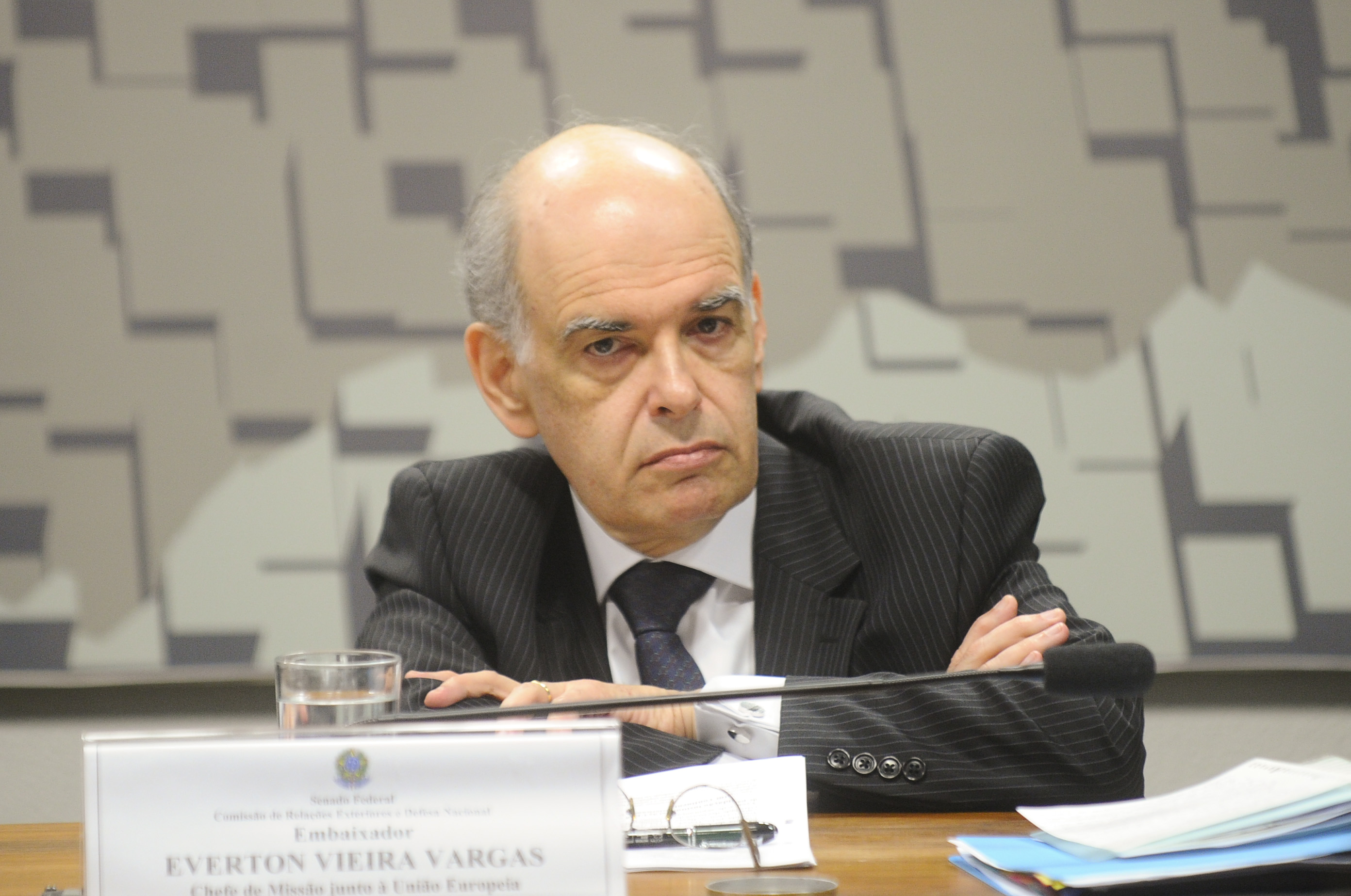 Comissão de Relações Exteriores e Defesa Nacional (CRE) realiza sabatina de embaixadores indicados para os Estados Unidos da América e para chefe da missão do Brasil junto à União Europeia. À mesa, o chefe da missão do Brasil junto à União Europeia, embaixador Everton Vieira Vargas. Foto: Marcos Oliveira/Agência Senado